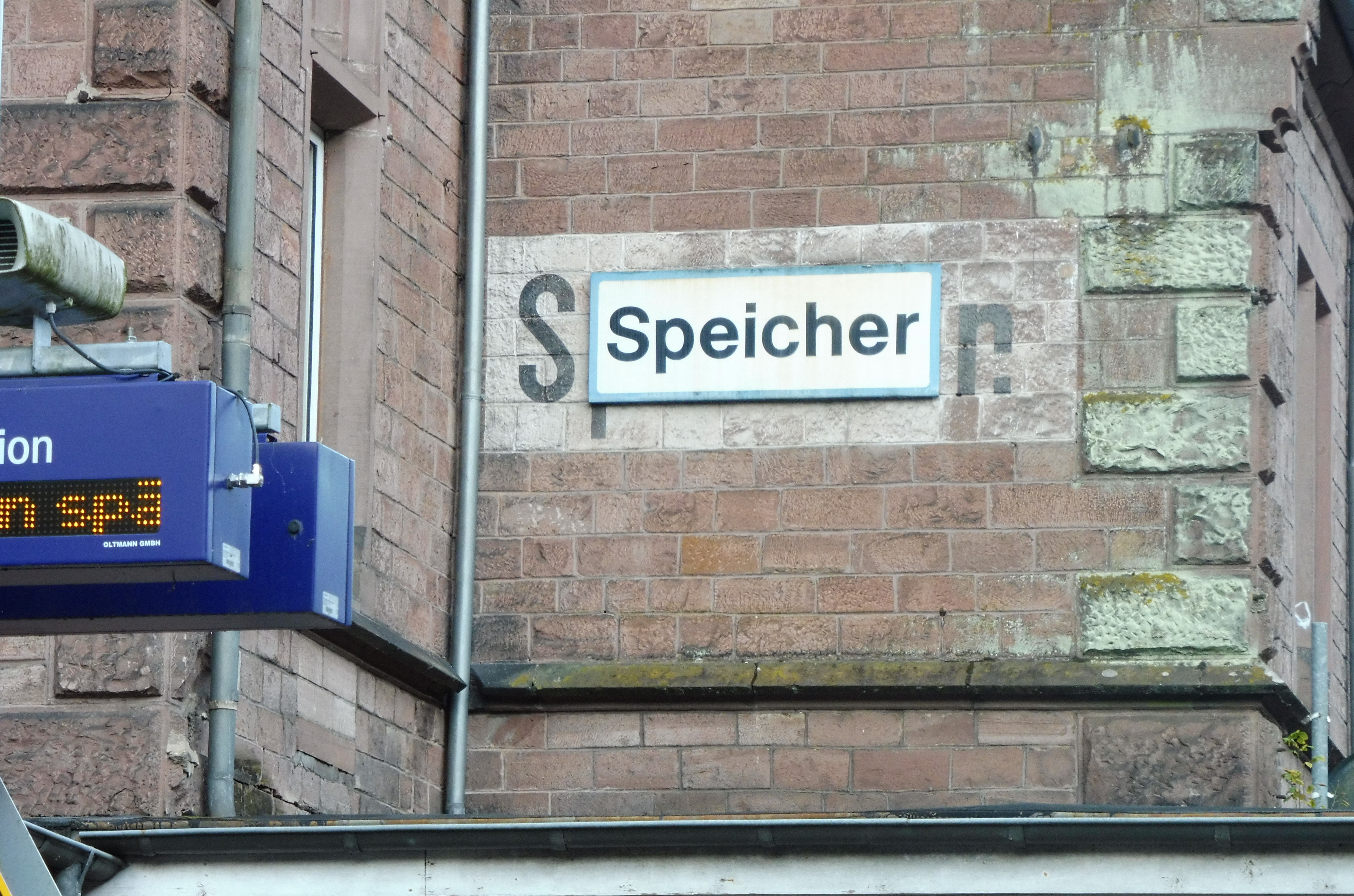 Neues Bahnhofsschild auf altem Mauergrund in Speicher